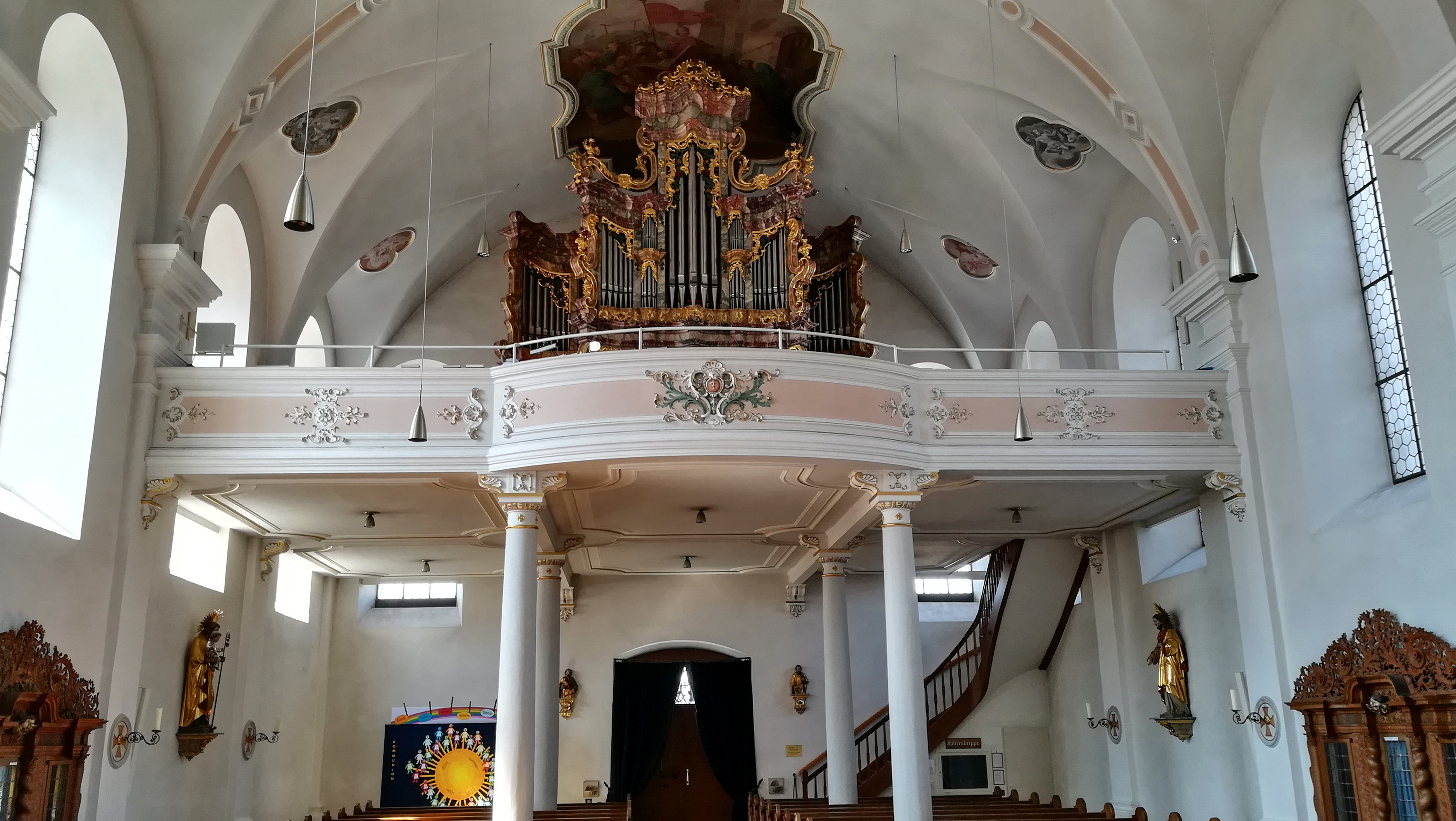 Die Stadtpfarrkirche Mariä Himmelfahrt ist eine katholische Pfarrkirche in der Stadt Furth im Wald.